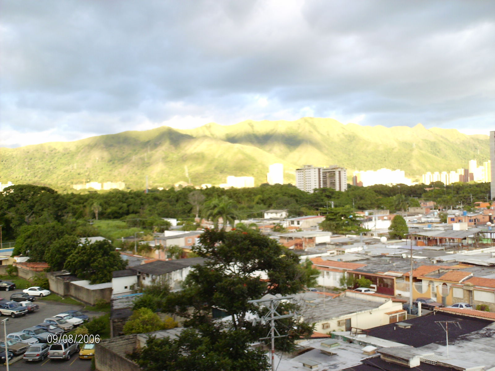 Vista de Las Quintas de Naguanagua